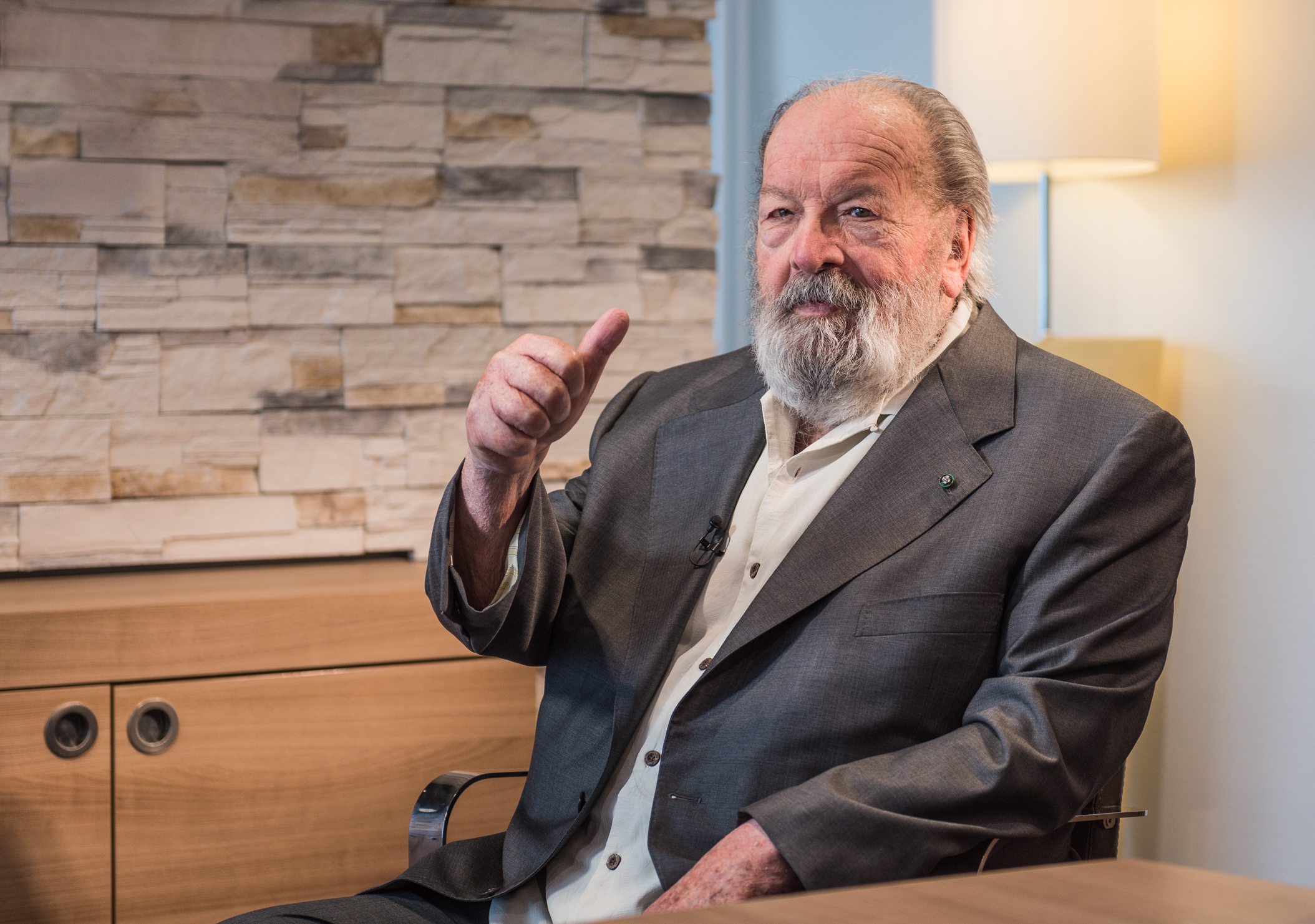 Bud Spencer 2015 in Berlin.